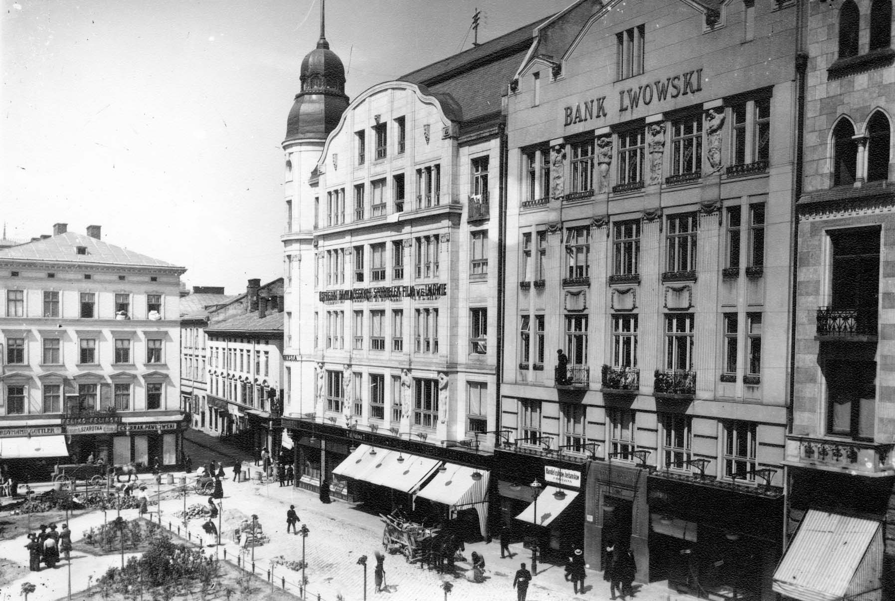 Вулиця Валова у Львові.